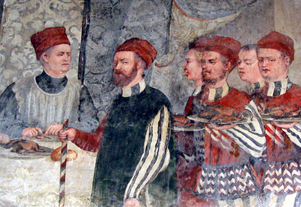 Il Romanino (attribuito a), Banchetto di Bartolomeo Colleoni in onore di Cristiano I di Danimarca (1467). Dettaglio. Affresco dal Castello di Malpaga, già di Bartolomeo Colleoni. Foto di Giorces.